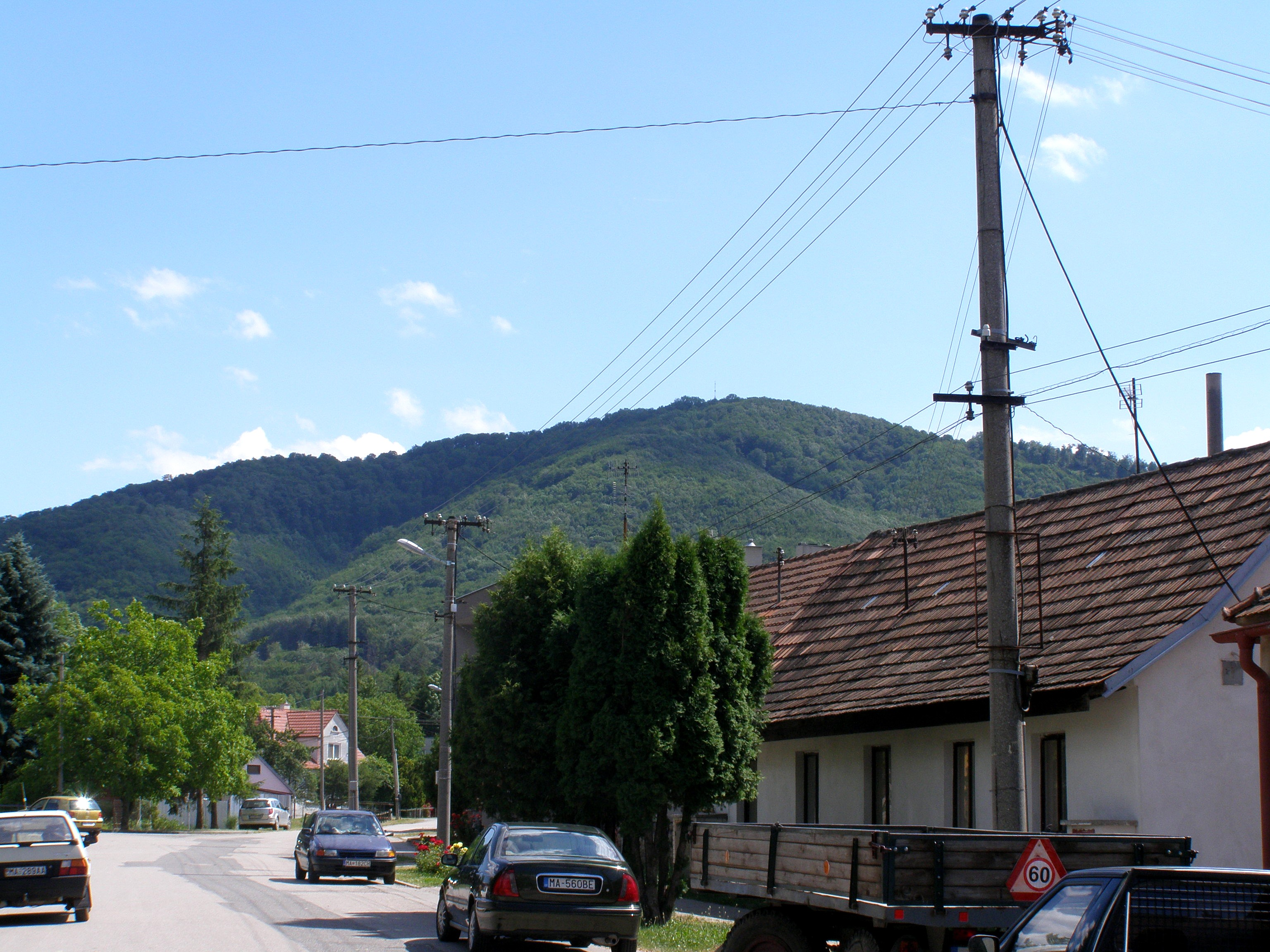 Pohľad na Vápennú (752 m n.m.) z centra Sološnice